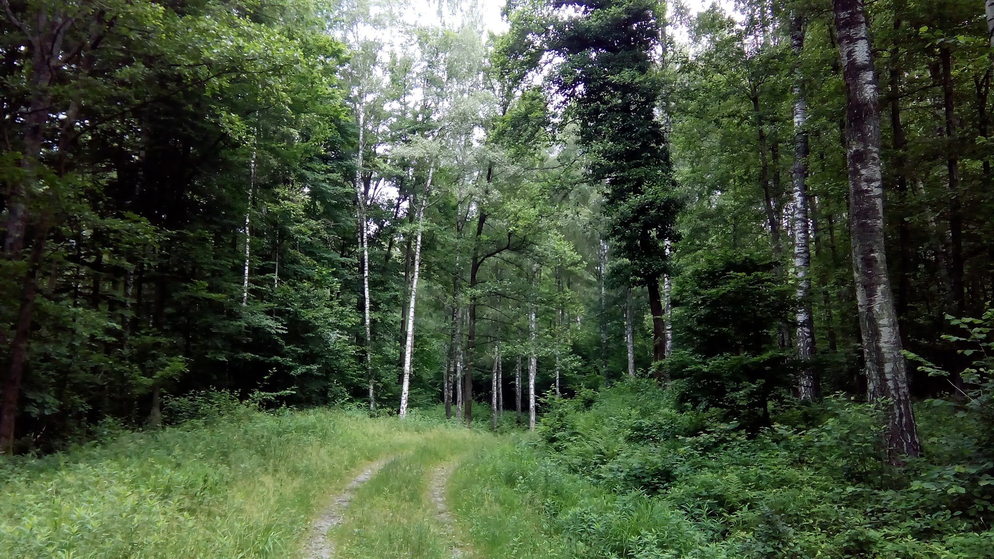 Gornji Borki, Croatia